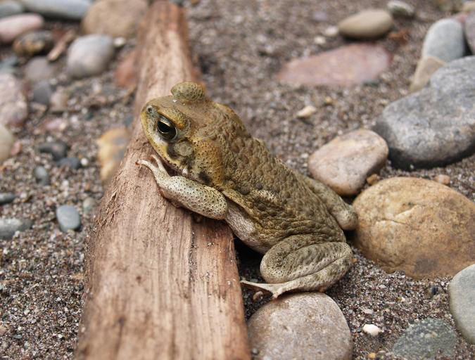 Bufo poeppigii